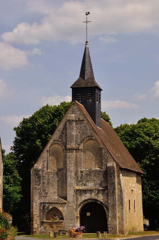 Vouillon (Indre) -- Eglise Saint-Saturnin